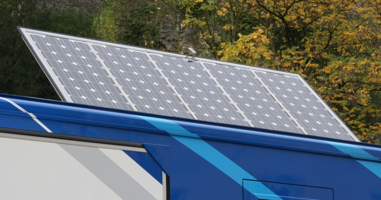 Solarpanneauen um Galileo Science Mobil (Oktober 2005).